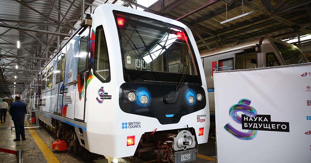 Поезд в депо